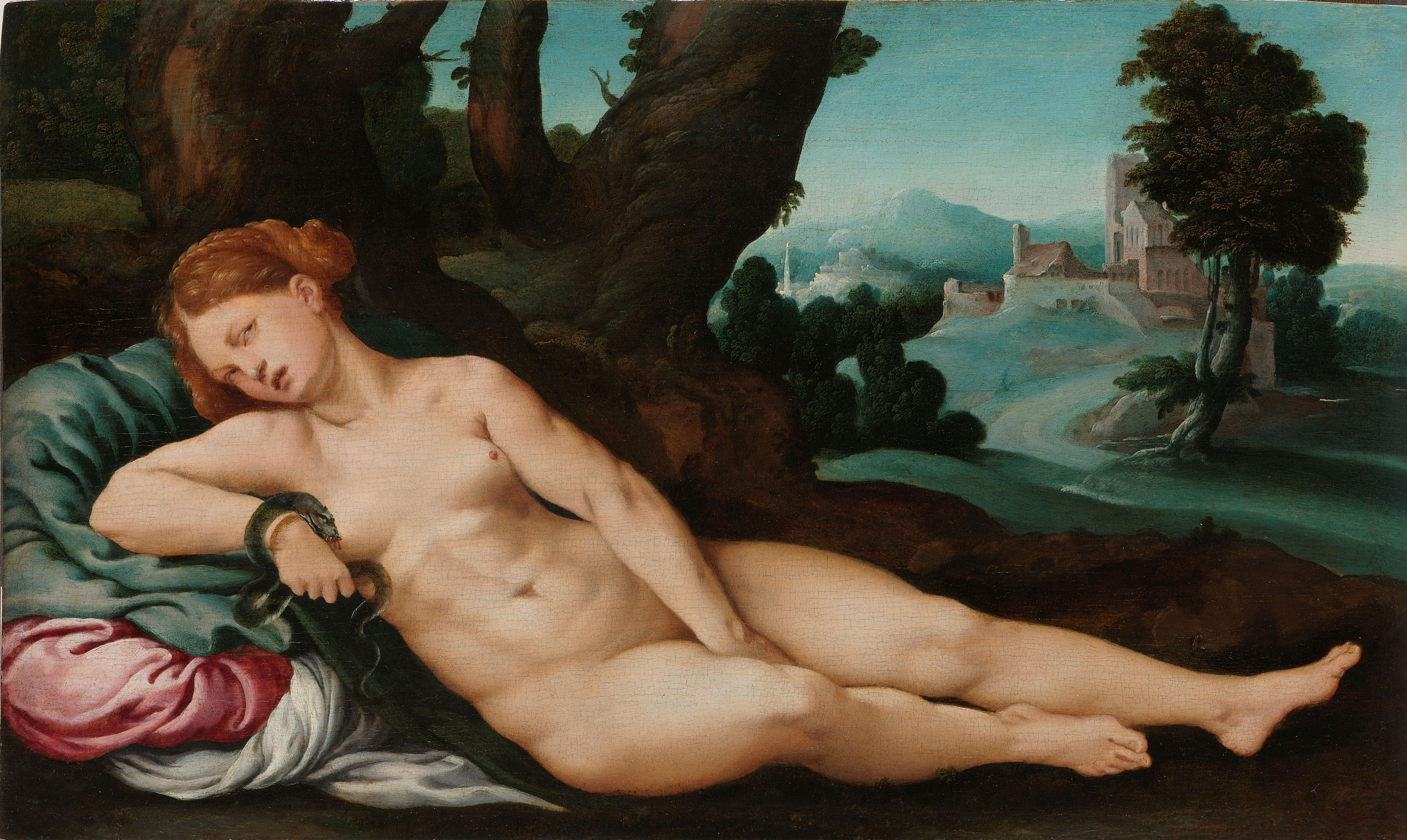 De stervende Egyptische koningin Cleopatra. Cleopatra ligt naakt op de voorgrond in een landschap met de adder in de rechterhand bij haar borst.